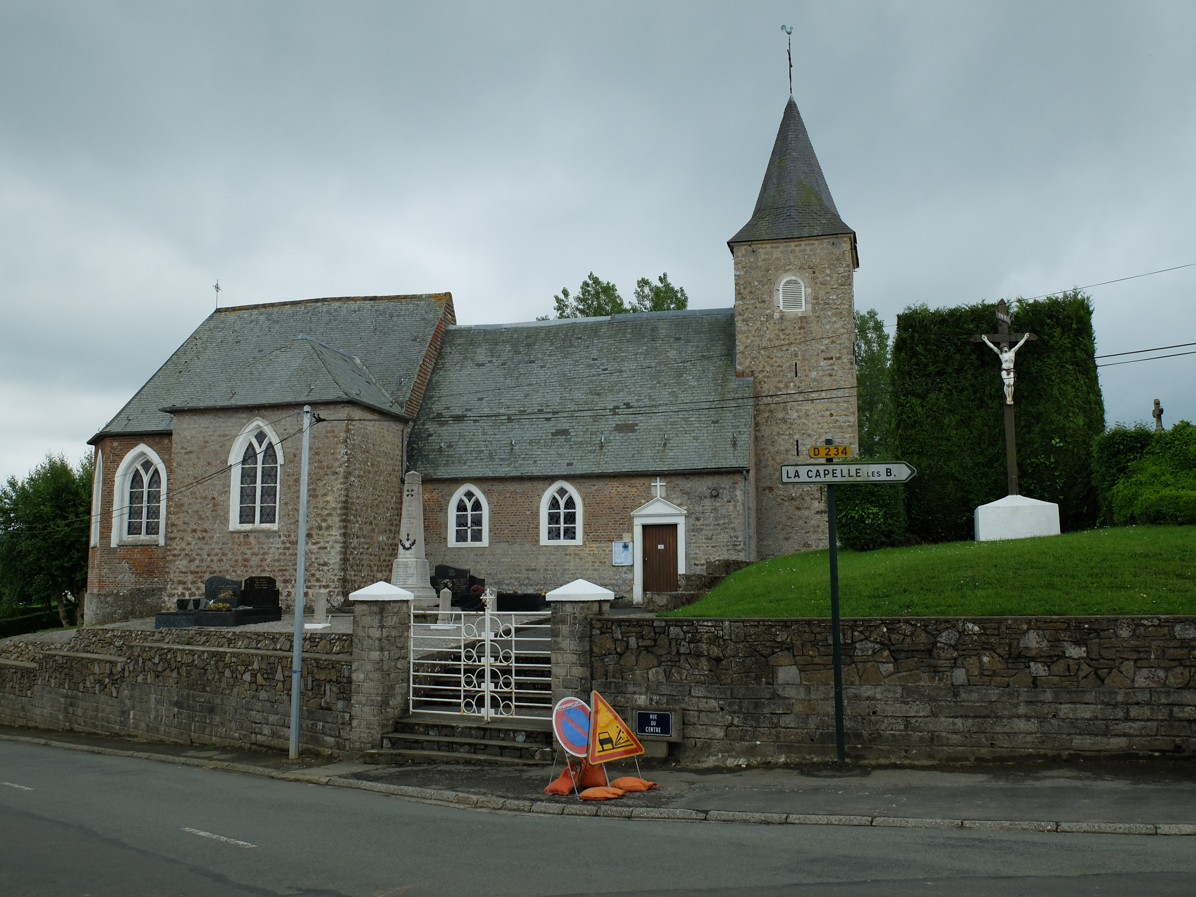 Vue de l'église Sainte-Marie-Madeleine de Conteville-lès-Boulogne.